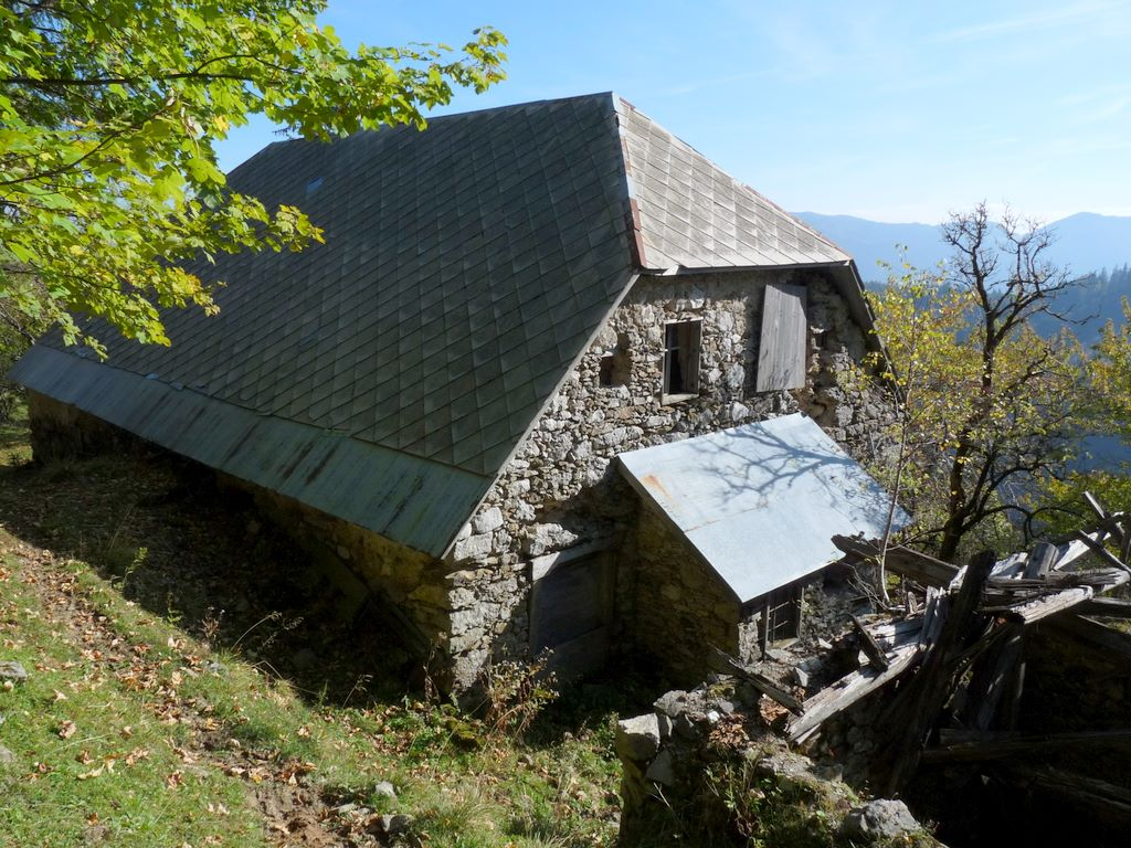 Gornji Špeh